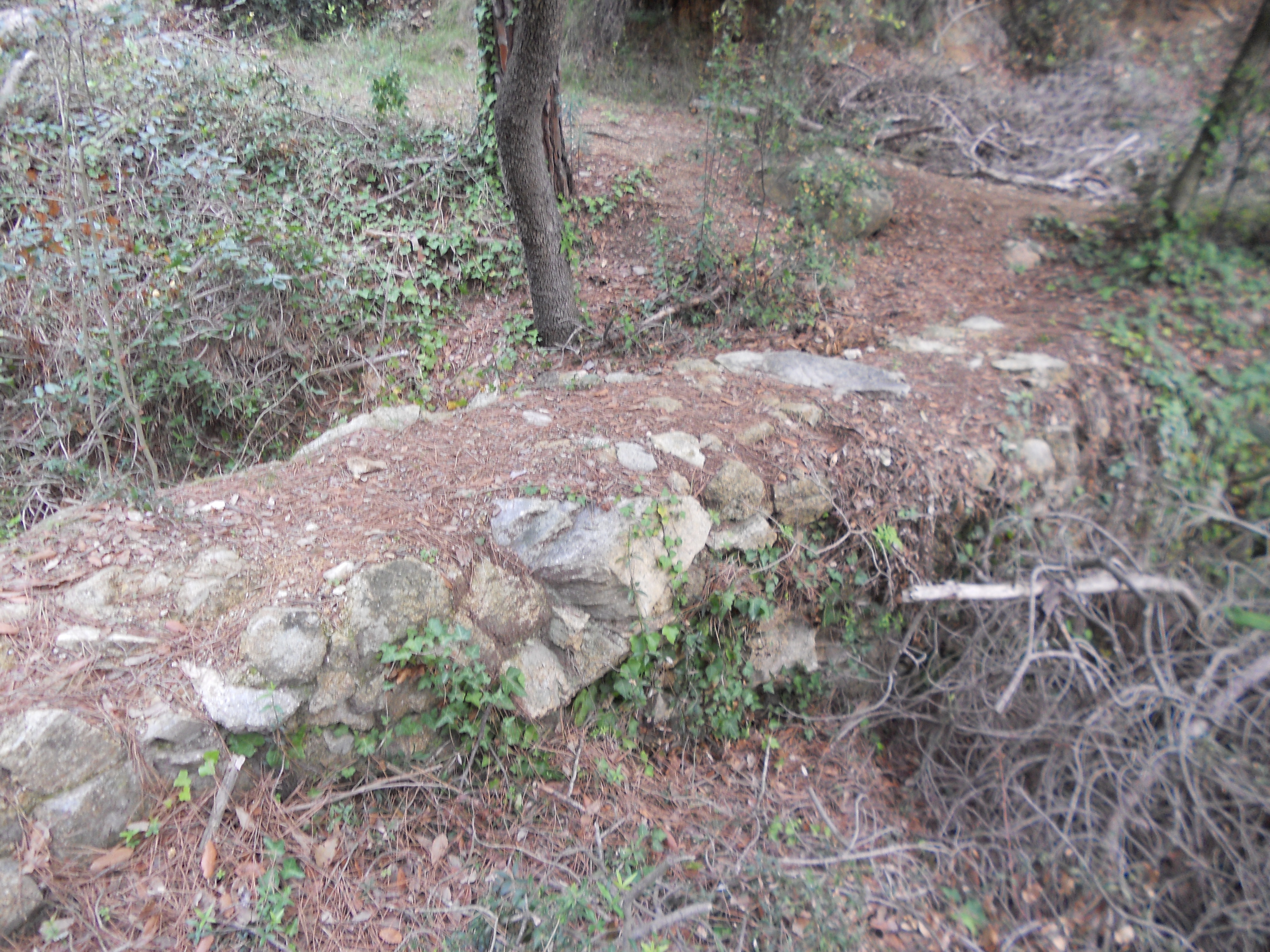 Murs de la via romana de Parpers, coneguda com Via Sèrgia, que anava des d'Iluro (Mataró) fins Ausa (Vic).